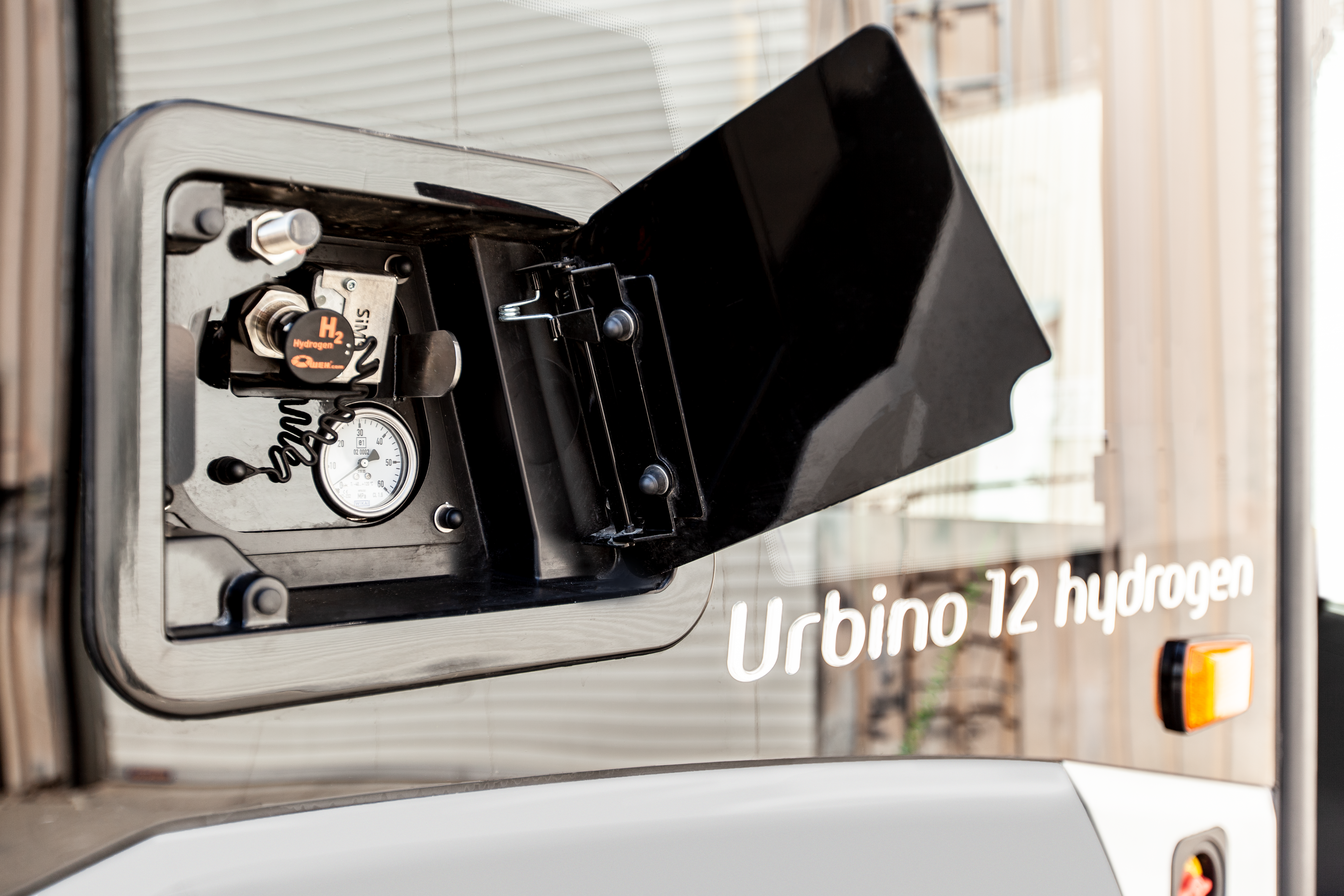 Solaris Urbino 12 hydrogen